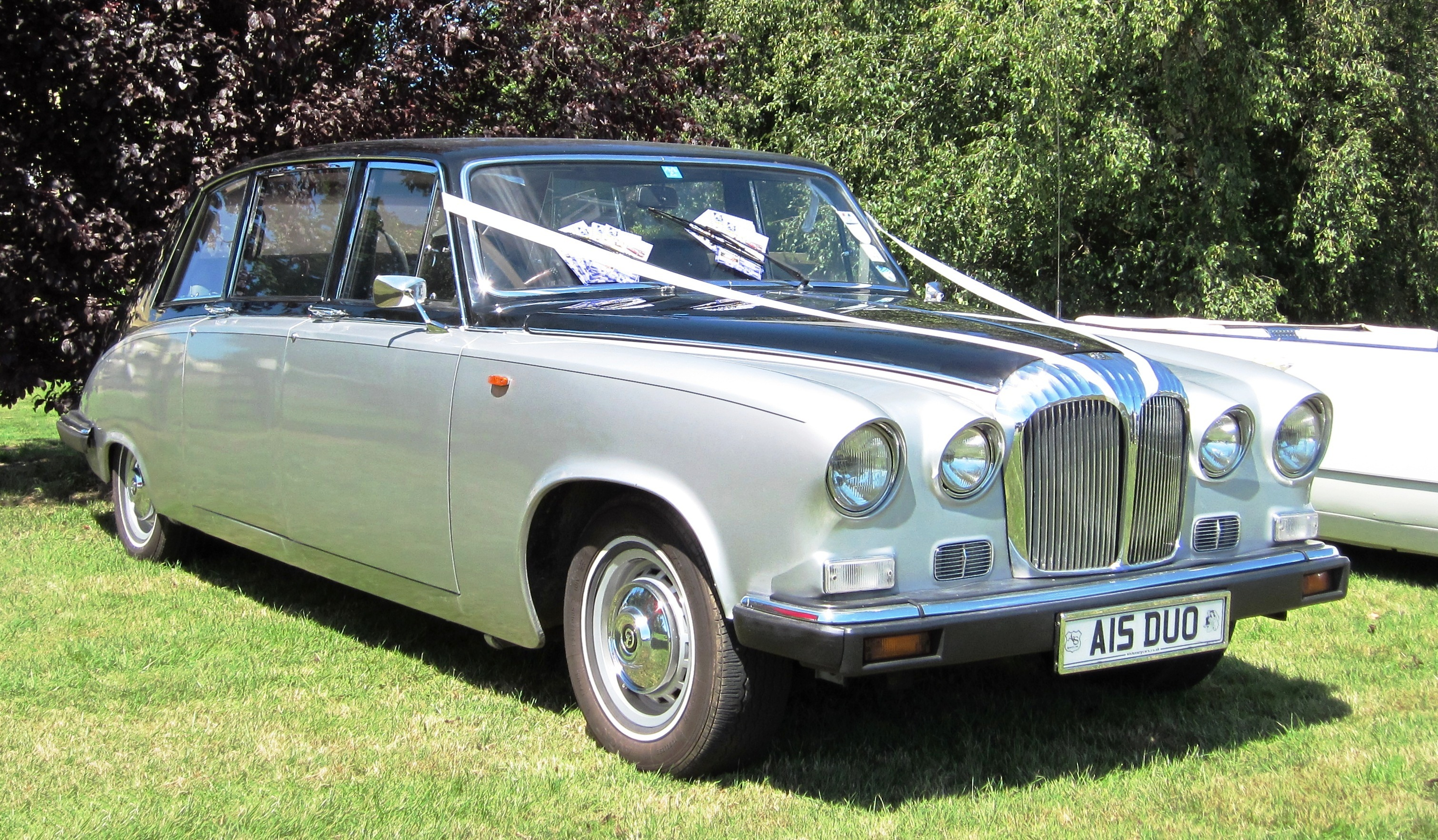 Daimler DS420 dans Essex